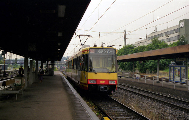 Stadtbahn car at Muhlacker